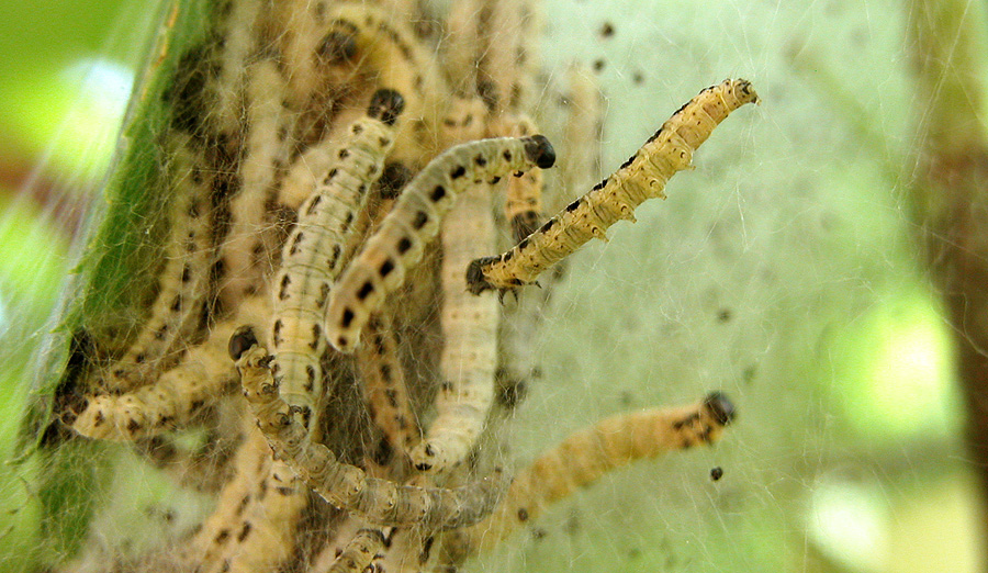 Гусеницы. Эти гусеницы пожрали не одно дерево. Напасть была летом 2005-ого года.